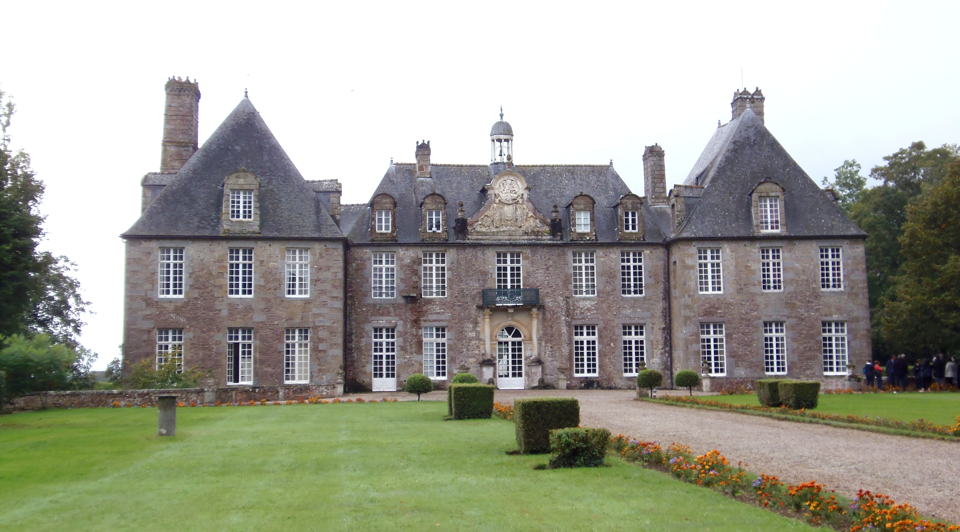 Rabodanges (Normandie, France). Le château.